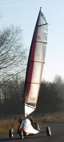 blokart met pod